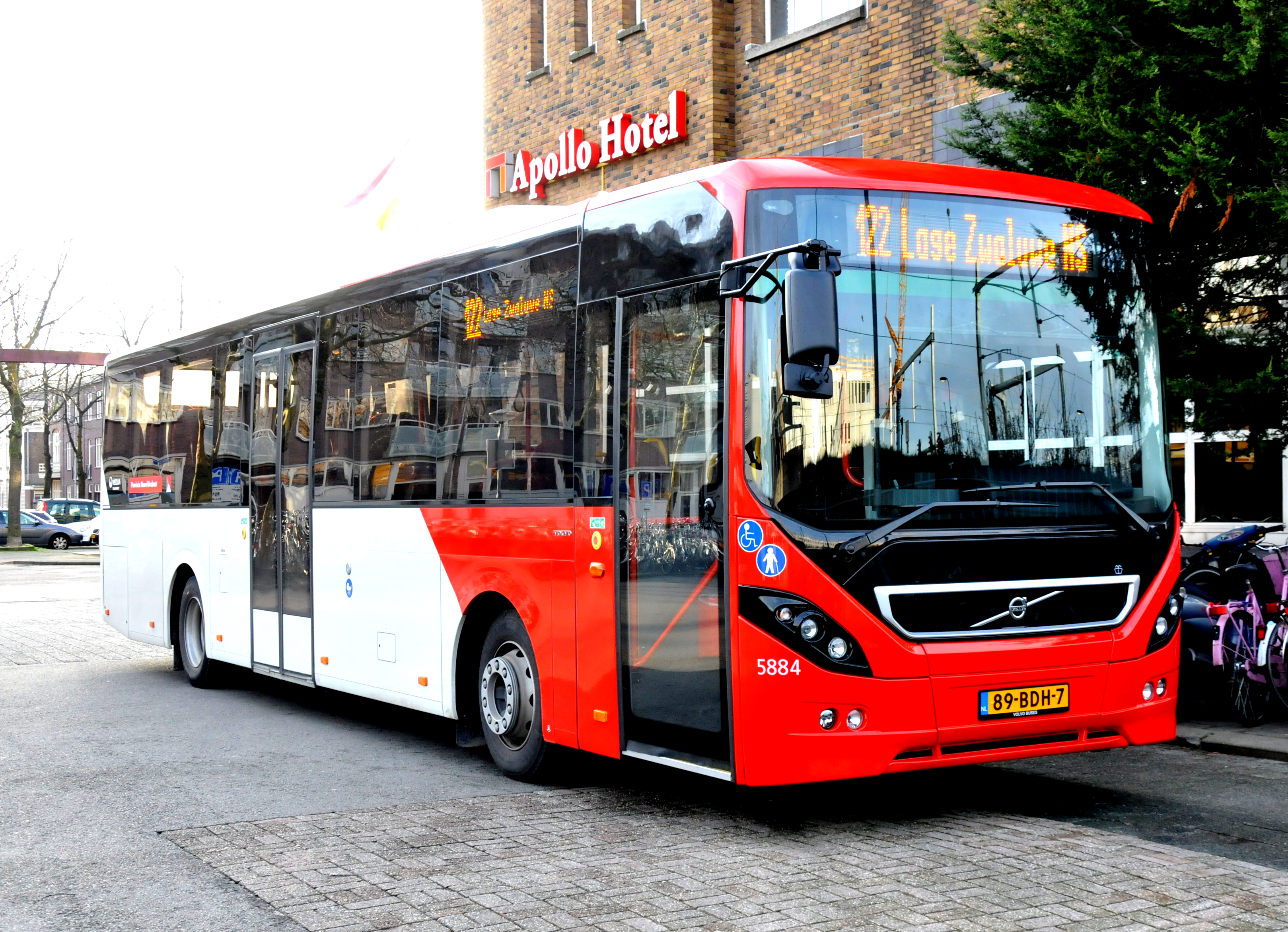 Veolia bus 5884 van het type Volvo 8900 (bj: 2013) in Breda ingezet.